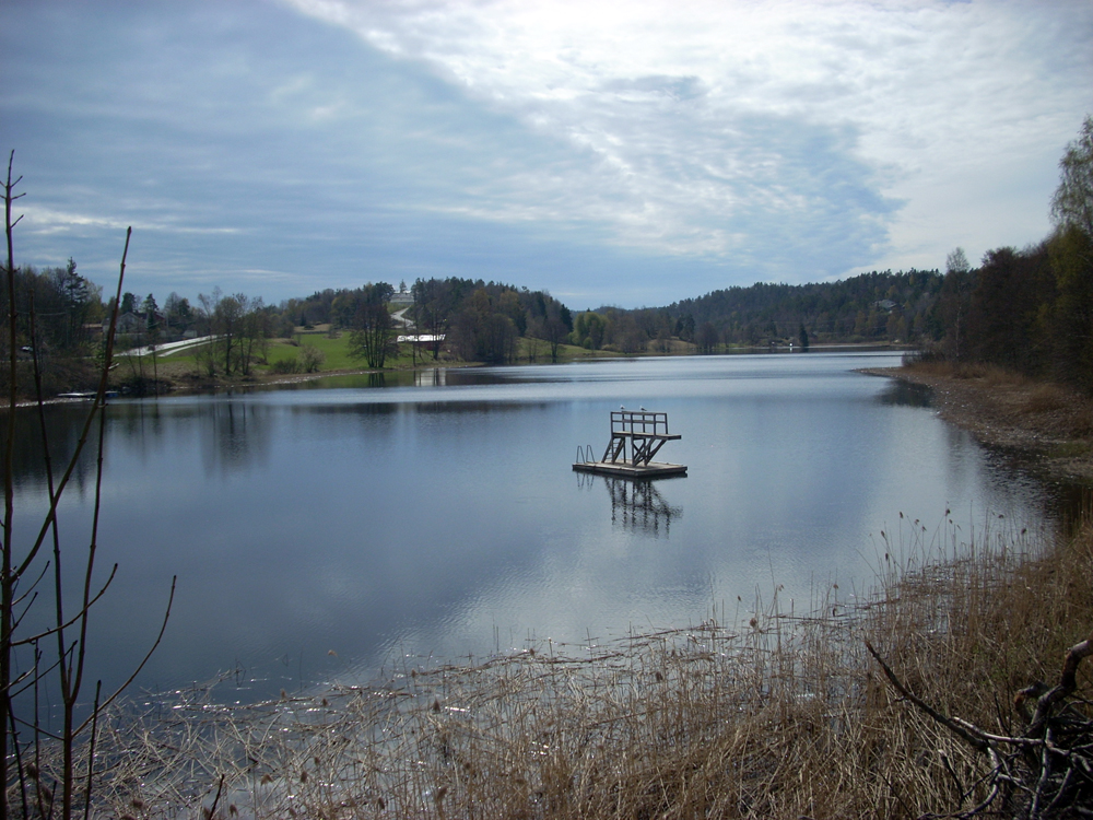 Longumvannet i Arendal, Norge